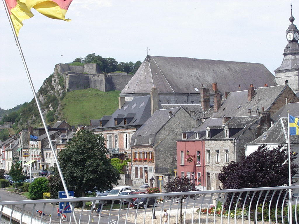 Fort De Charlemont et Eglise St Hilaire